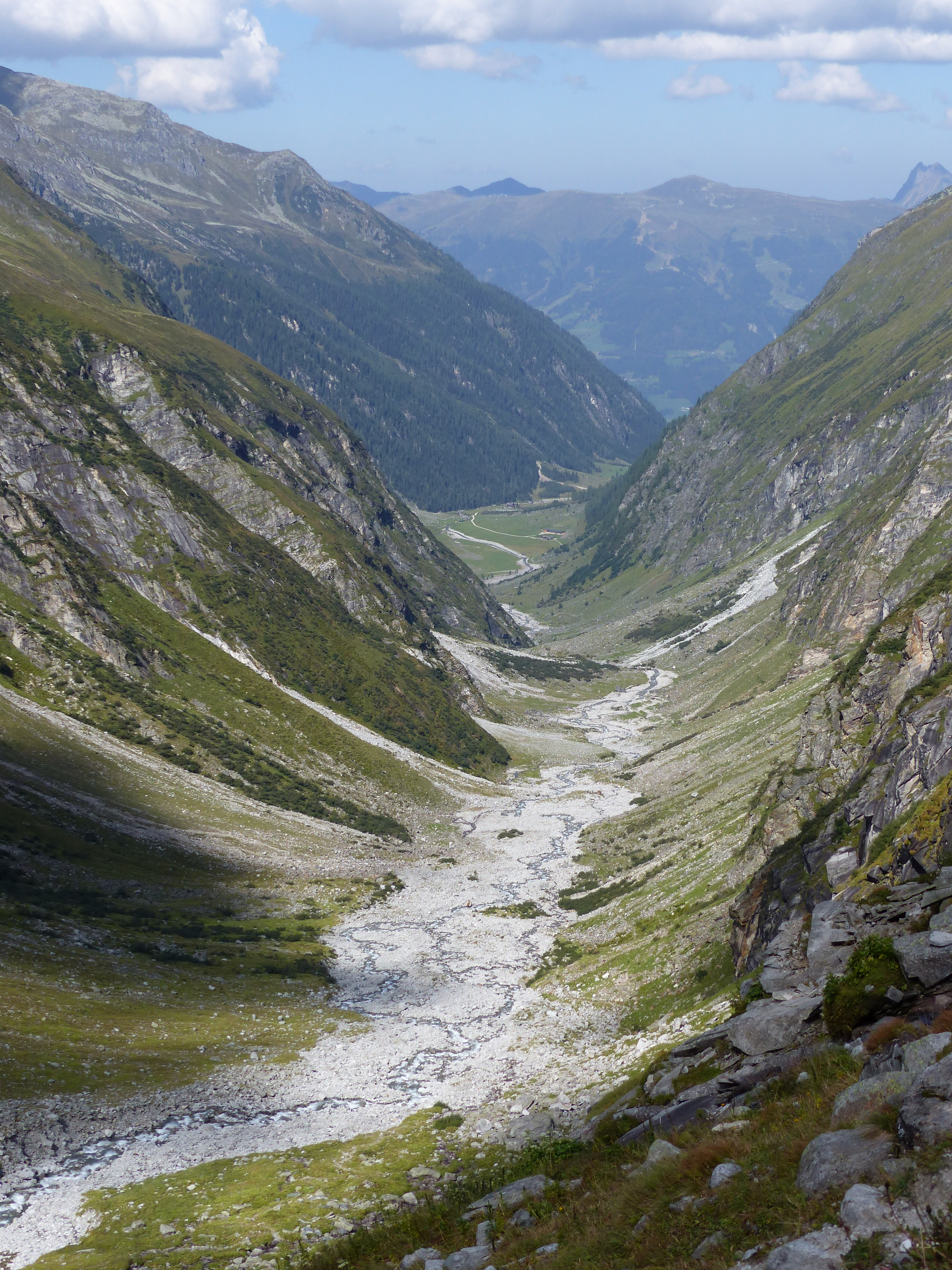 Blick vom Talschluss ins Habachtal (beim Abstieg von der Neuen Thüringer Hütte)